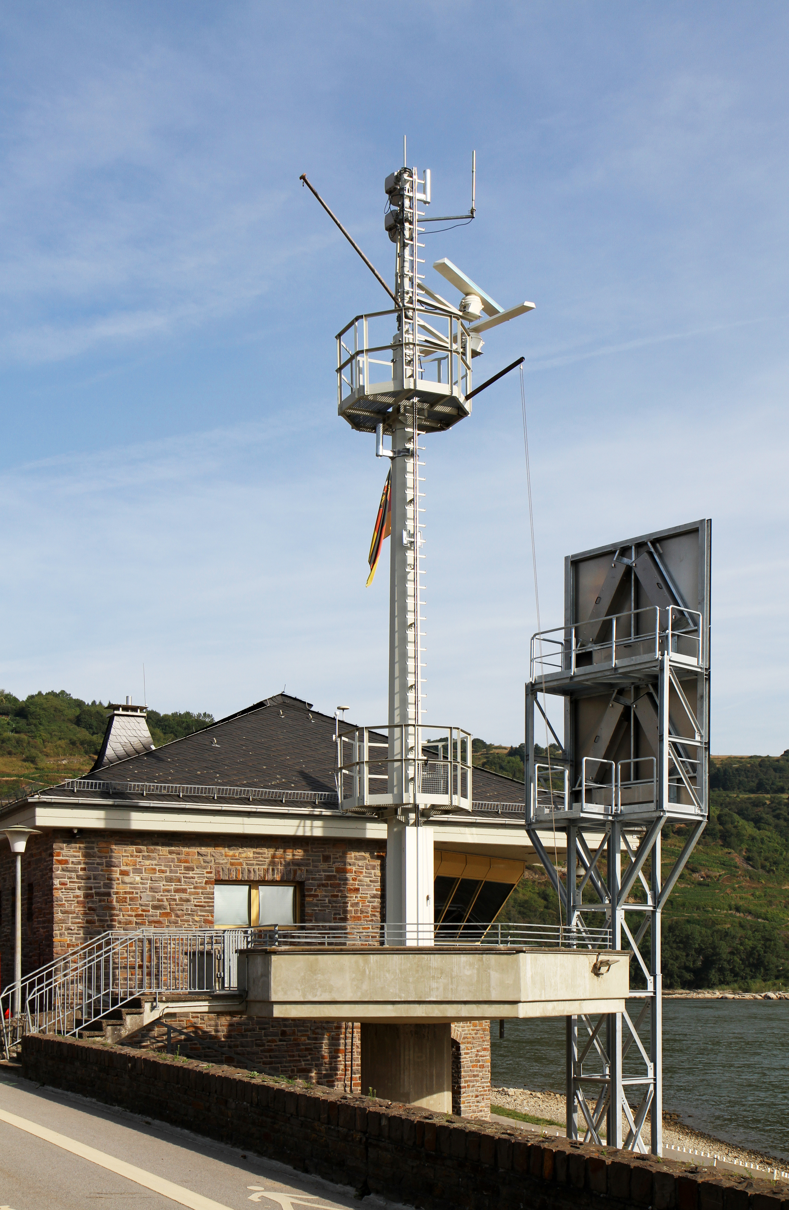 Revierzentrale des Wasserstraßen- und Schifffahrtsamtes Bingen, Außenbezirk St.Goar. Funk-, Radaranlage und Wahrschau am Rheinufer bei Oberwesel